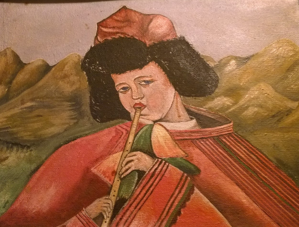 Marian Ratusiński, olej na płótnie, Chłopczyk (kopia Chłopca z fujarką Zofii Stryjeńskiej